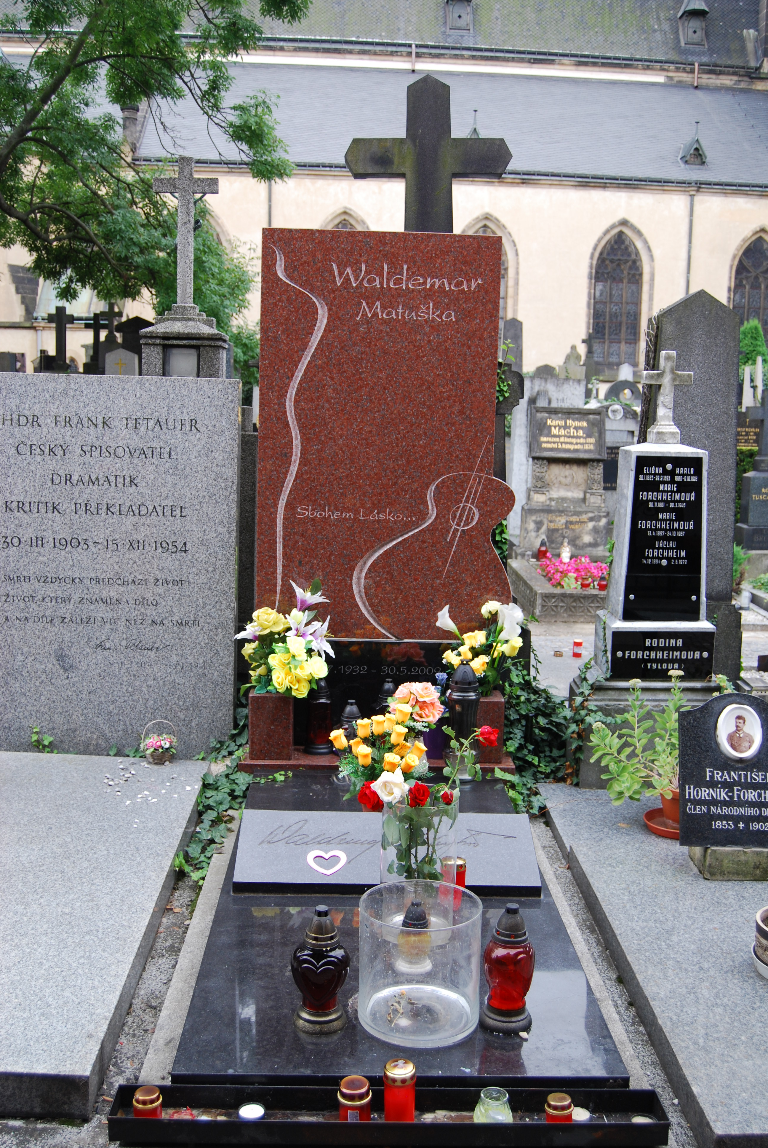 Jednotlivé náhrobky. Slavín (hrobka). Waldemar Matuška. Vyšehradský hřbitov. Praha. Česká republika